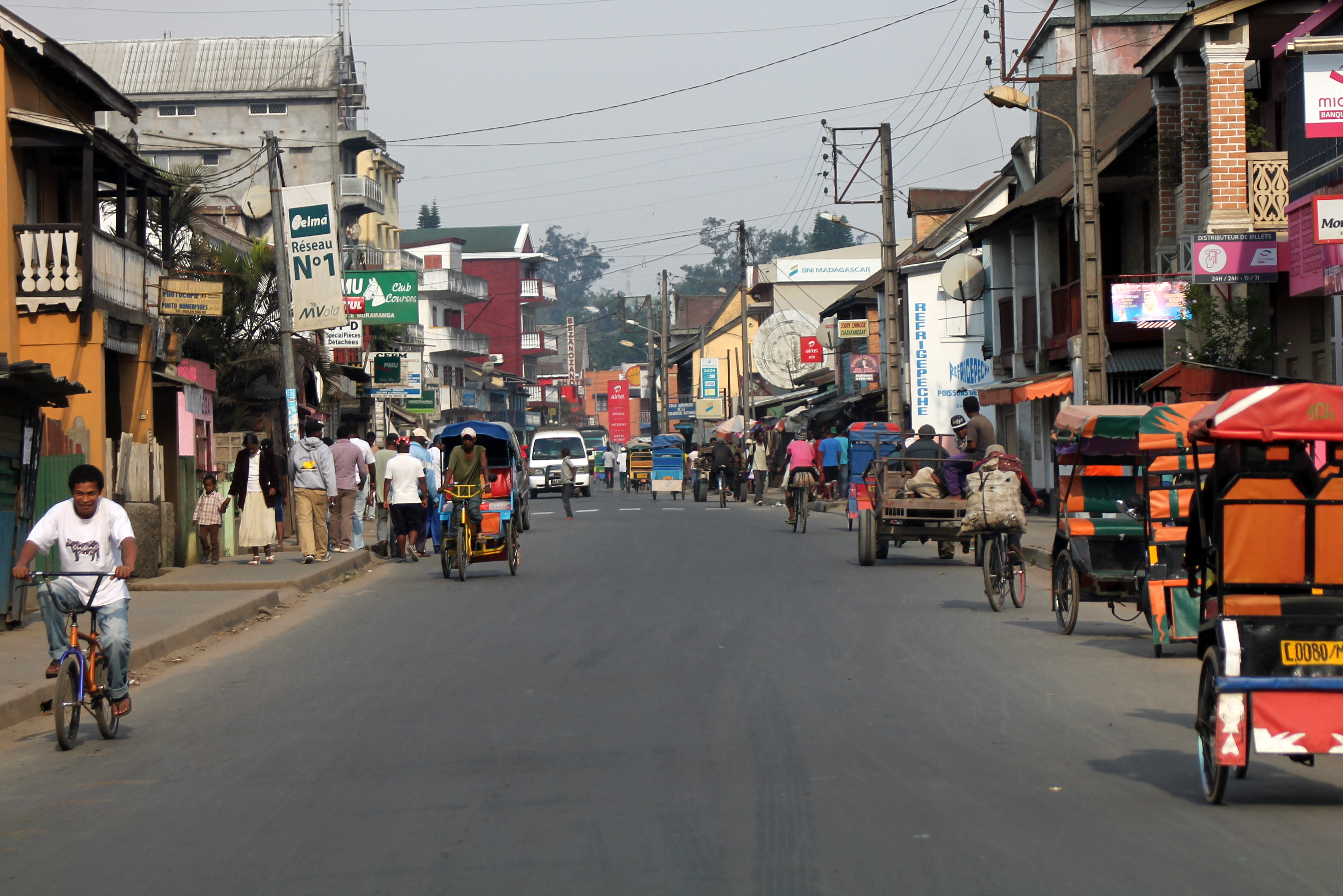 Moramanga, Madagaskar